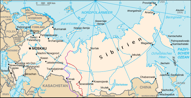 Verlauf des Ob-Irtysch Ob: Rot Irtysch: Dunkelblau selbstbearbeitet